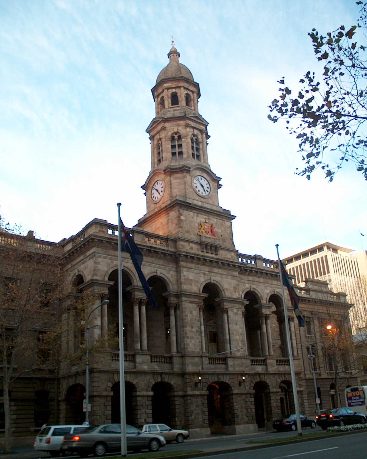 Edificios de Adelaida Parlamento de Adelaida Autor: Fernando Cuartero Fotografía propia, tomada en 2002 Adelaide Town Hall (NOT parliament house)